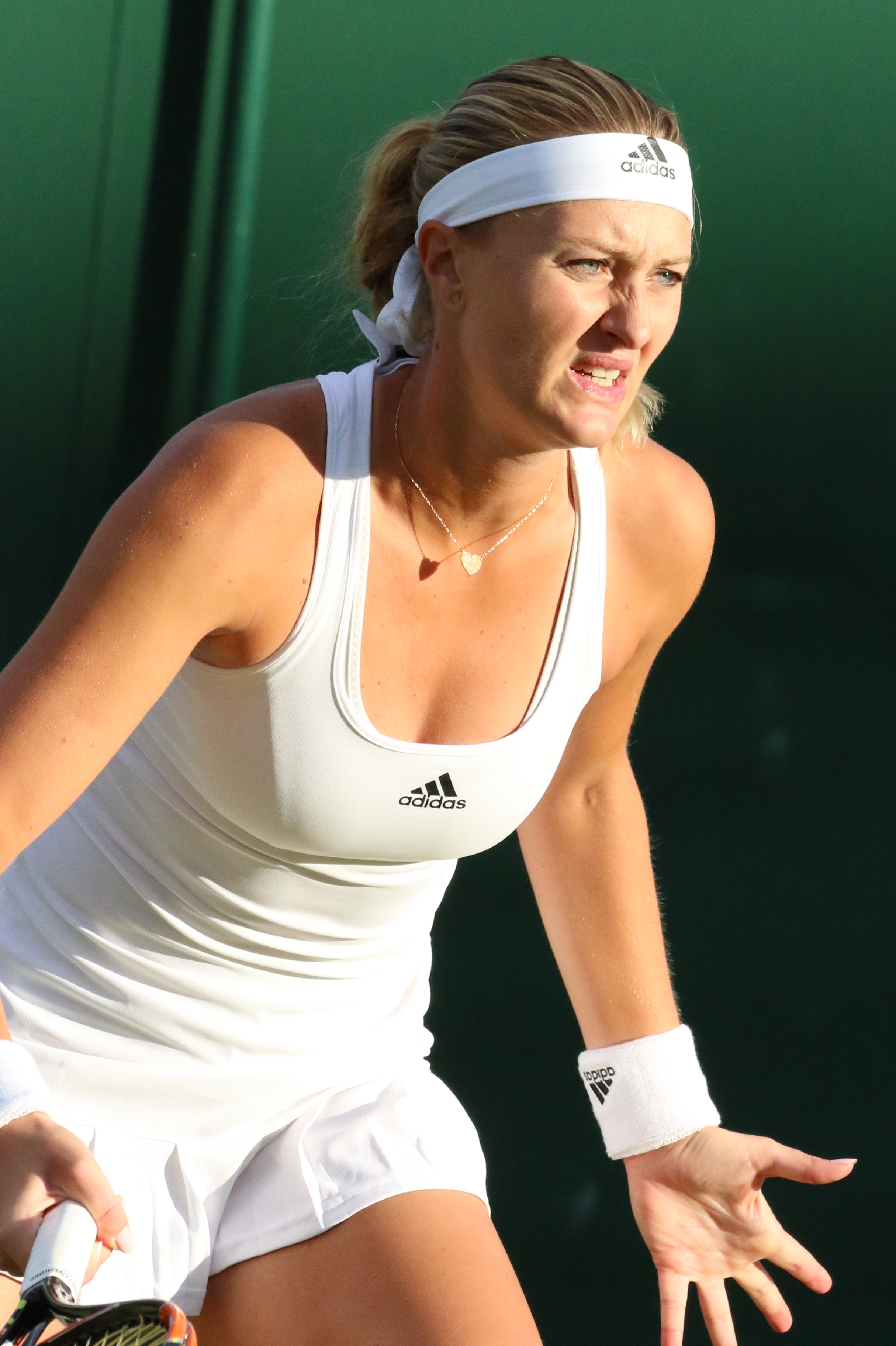 Mladenovic WM16 (5)